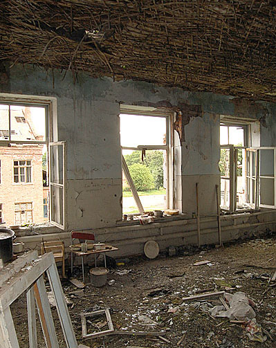 Школа № 1 г. Беслан. Кабинет осетинского языка по состоянию на июль 2008 года.